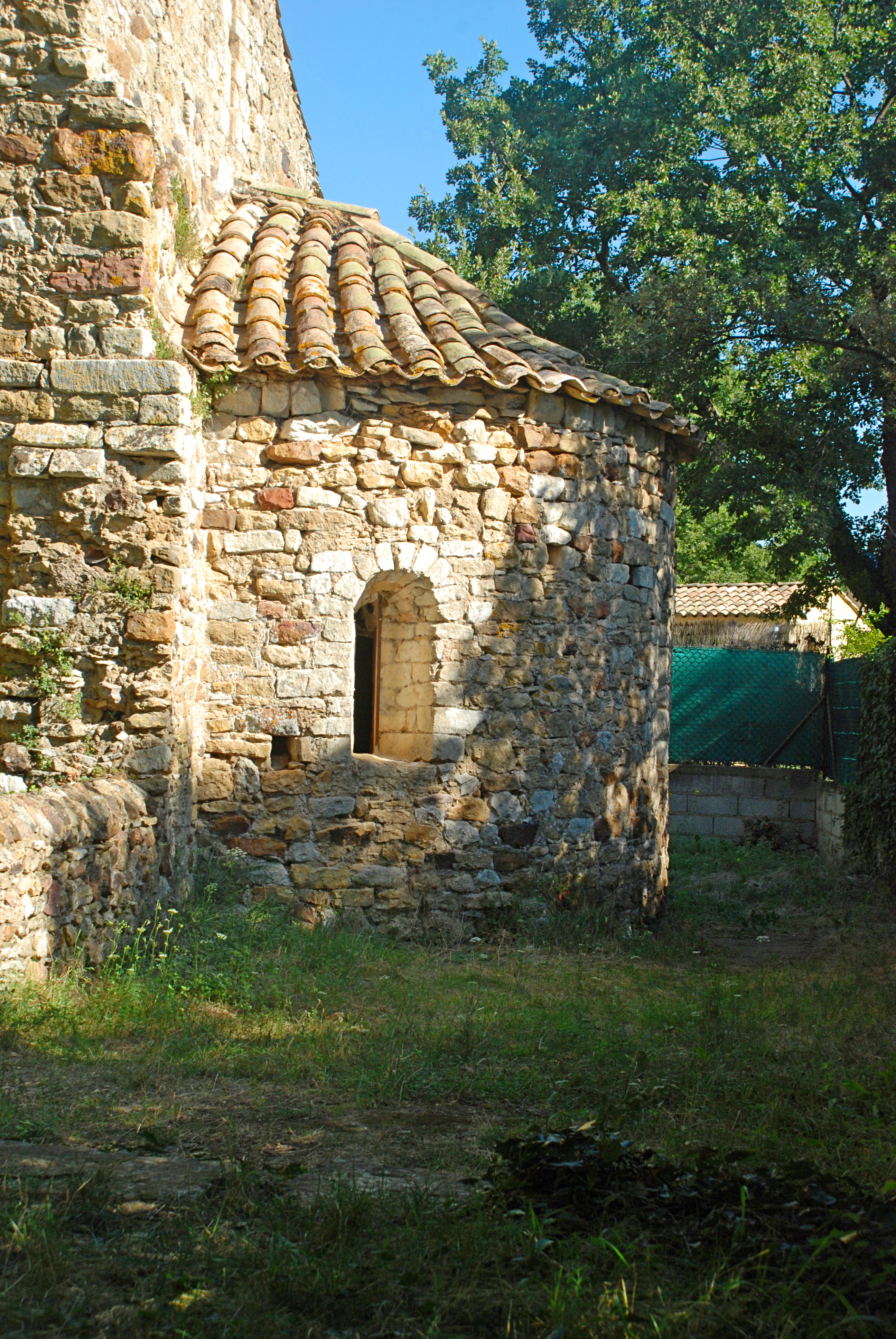 France - Gard - Chapelle Saint-Saturnin de Gaujac